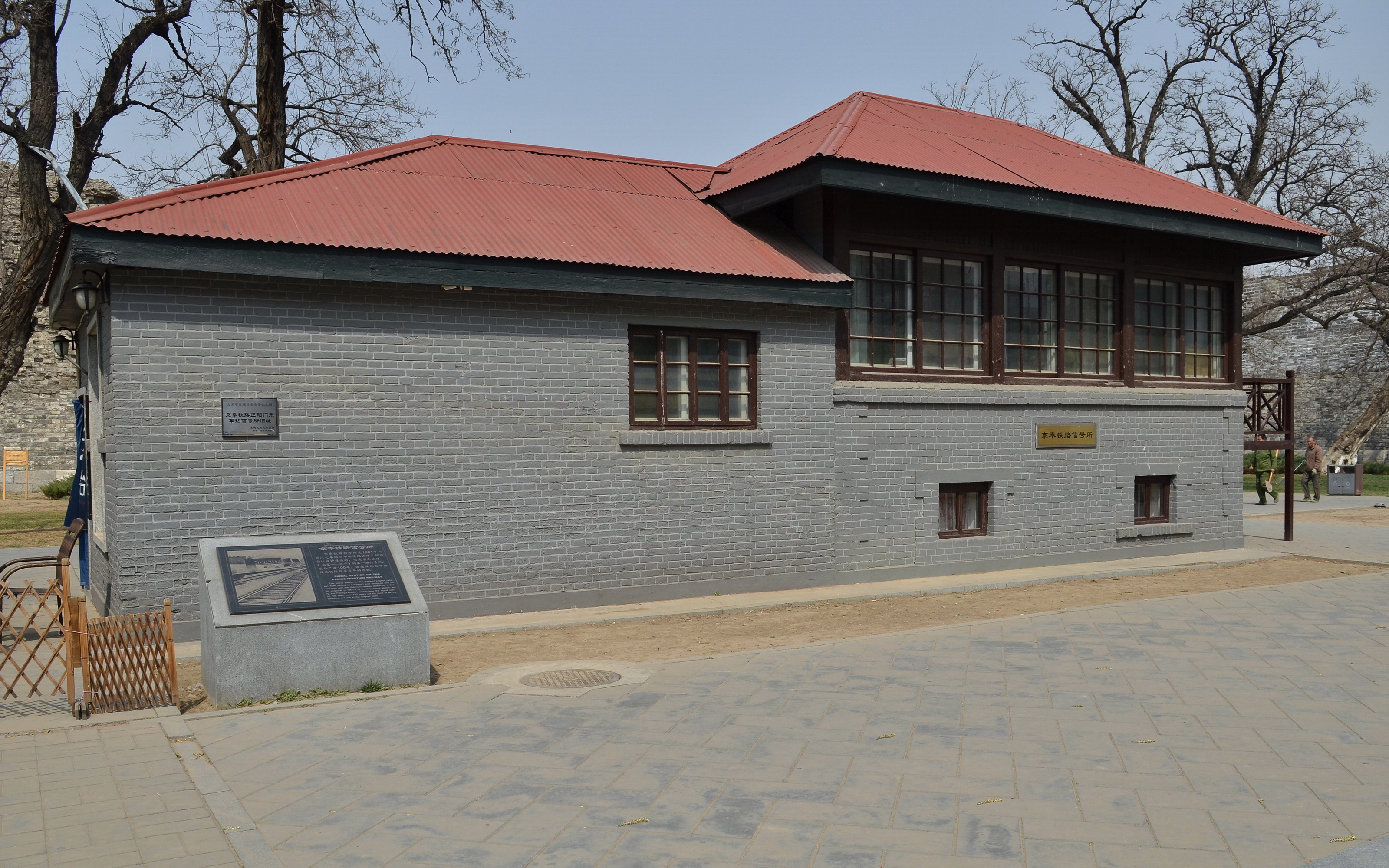 位于北京明代城墙遗址公园内的京奉铁路正阳门东车站信号所旧址